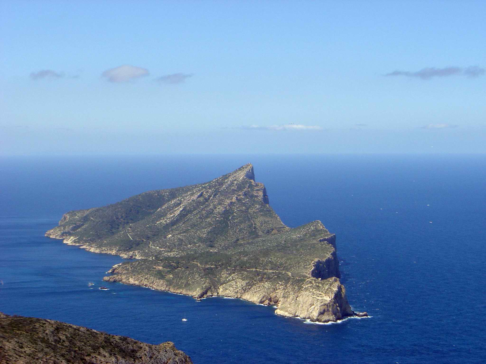 Sa Dragonera, vista des de La Trapa (Mallorca).